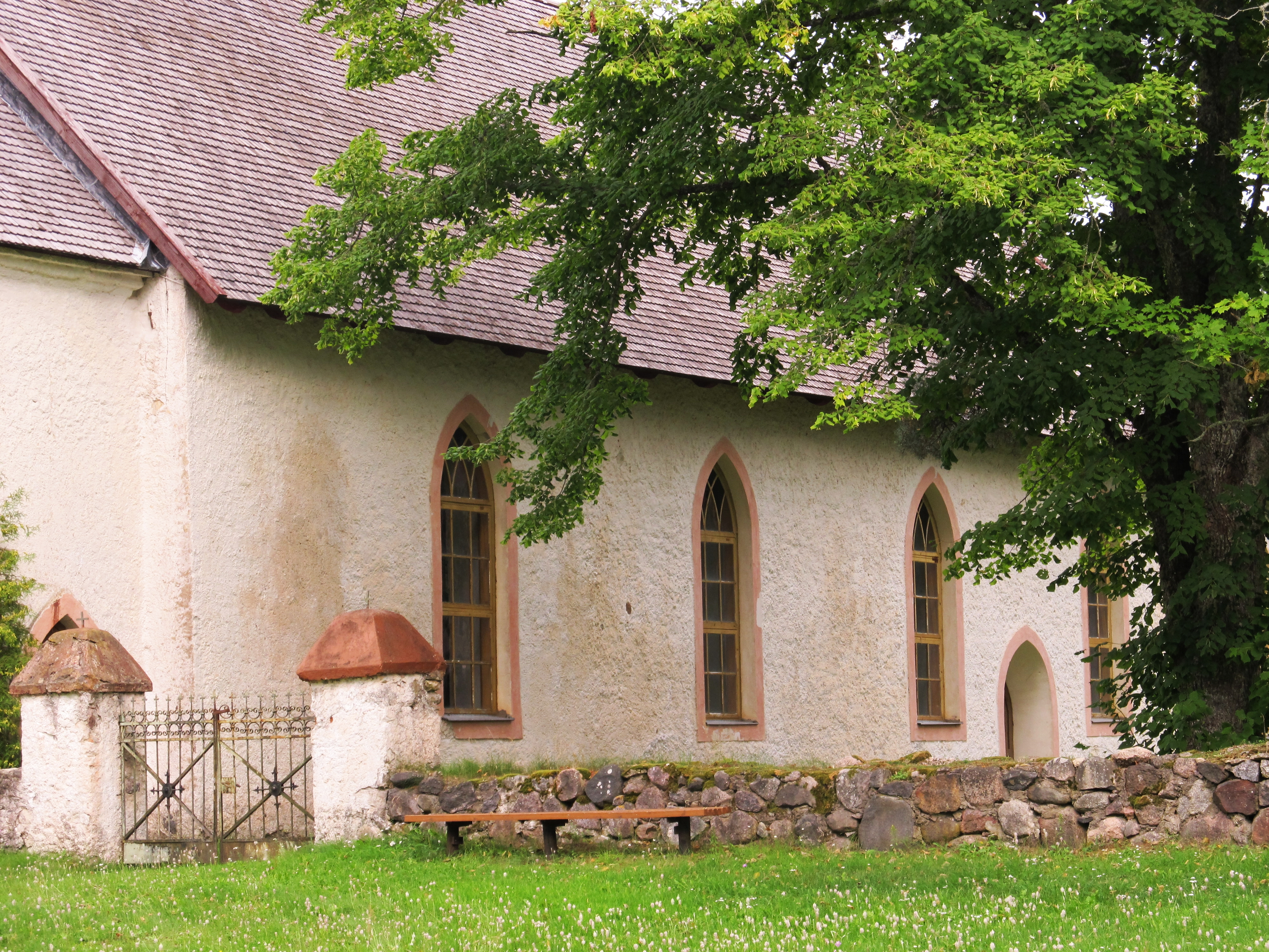 Varbla kirikuaia piirdemüür